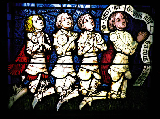 Ritter Cuno von Pyrmont und Ehrenberg mit drei Söhnen. Glasmalerei des 15. Jahrhunderts. Bis Anfang 19. Jh. in einem Stifterfenster der Karmeliterkirche von Boppard am Rhein. Seit Anfang 20. Jh. "Sommerhaus" der ehem. Ogden Goelet Villa, Newport/USA, heute katholische Salve-Regina-University.